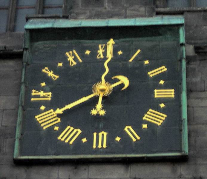 Zifferblatt der Turmuhr des Roten Turms in Halle